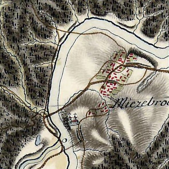 02014 Miedzybrodzer Ansichten um 1783